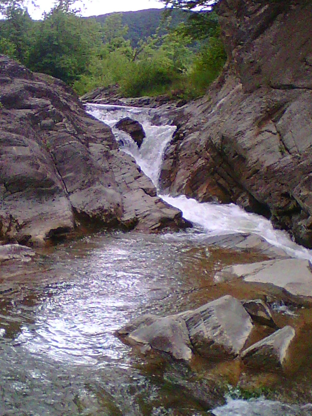 Зображення водоспаду в Закарпатті